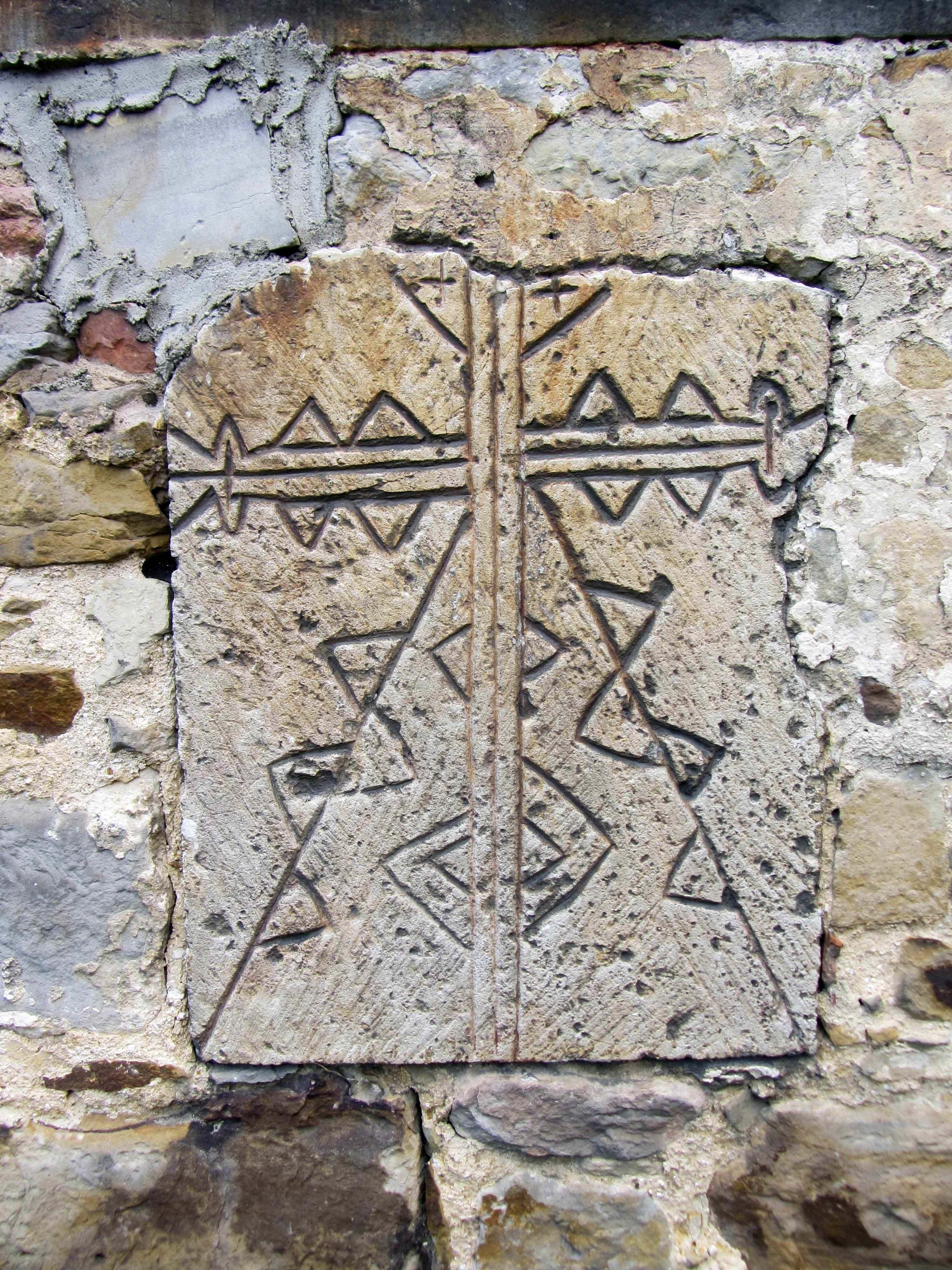 Steinkreuz, im Ostgiebel der Sankt-Petrus-Kirche in Ingersleben OT Morsleben